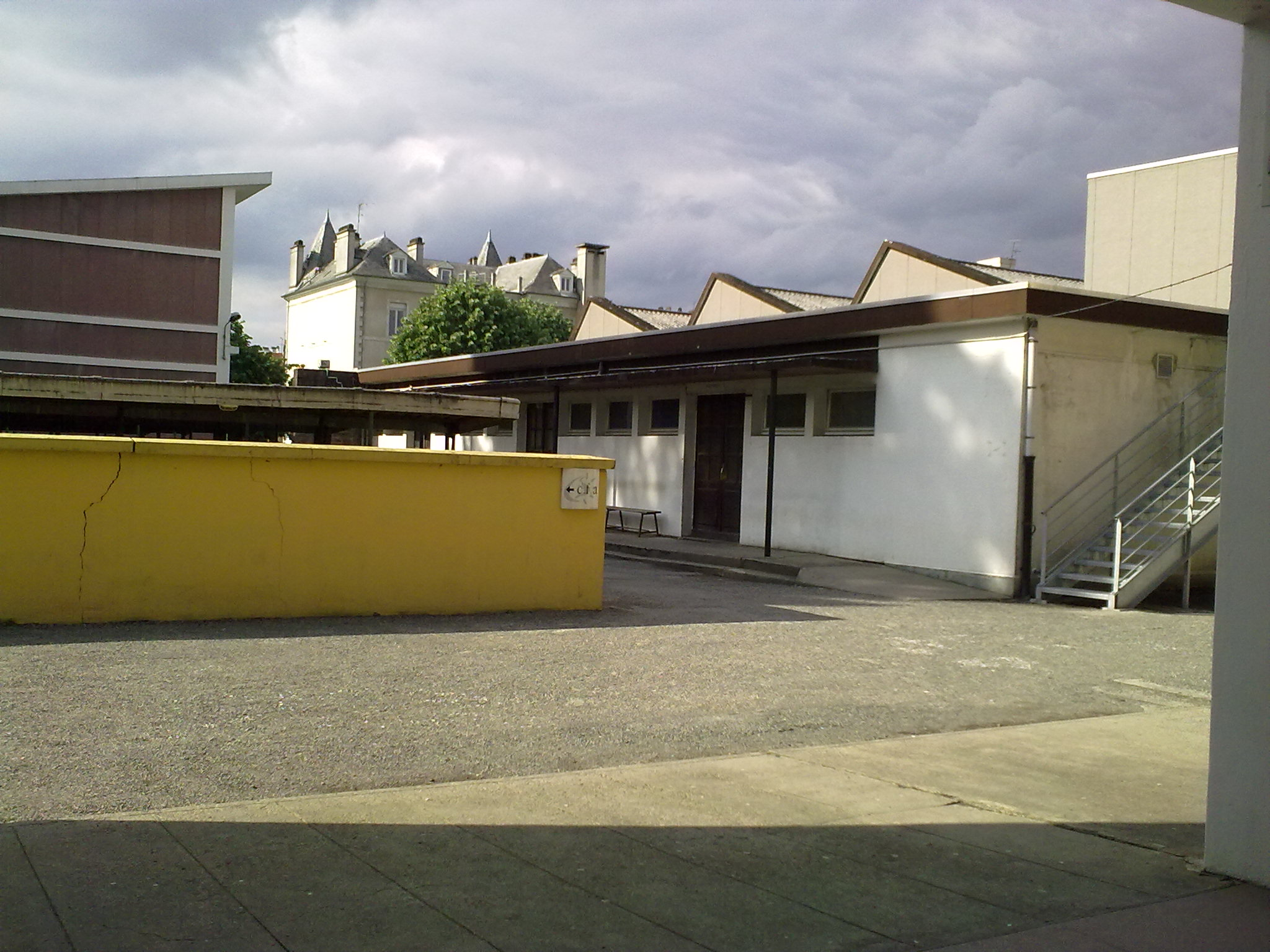 lycée Saint - Cricq, Pau, France